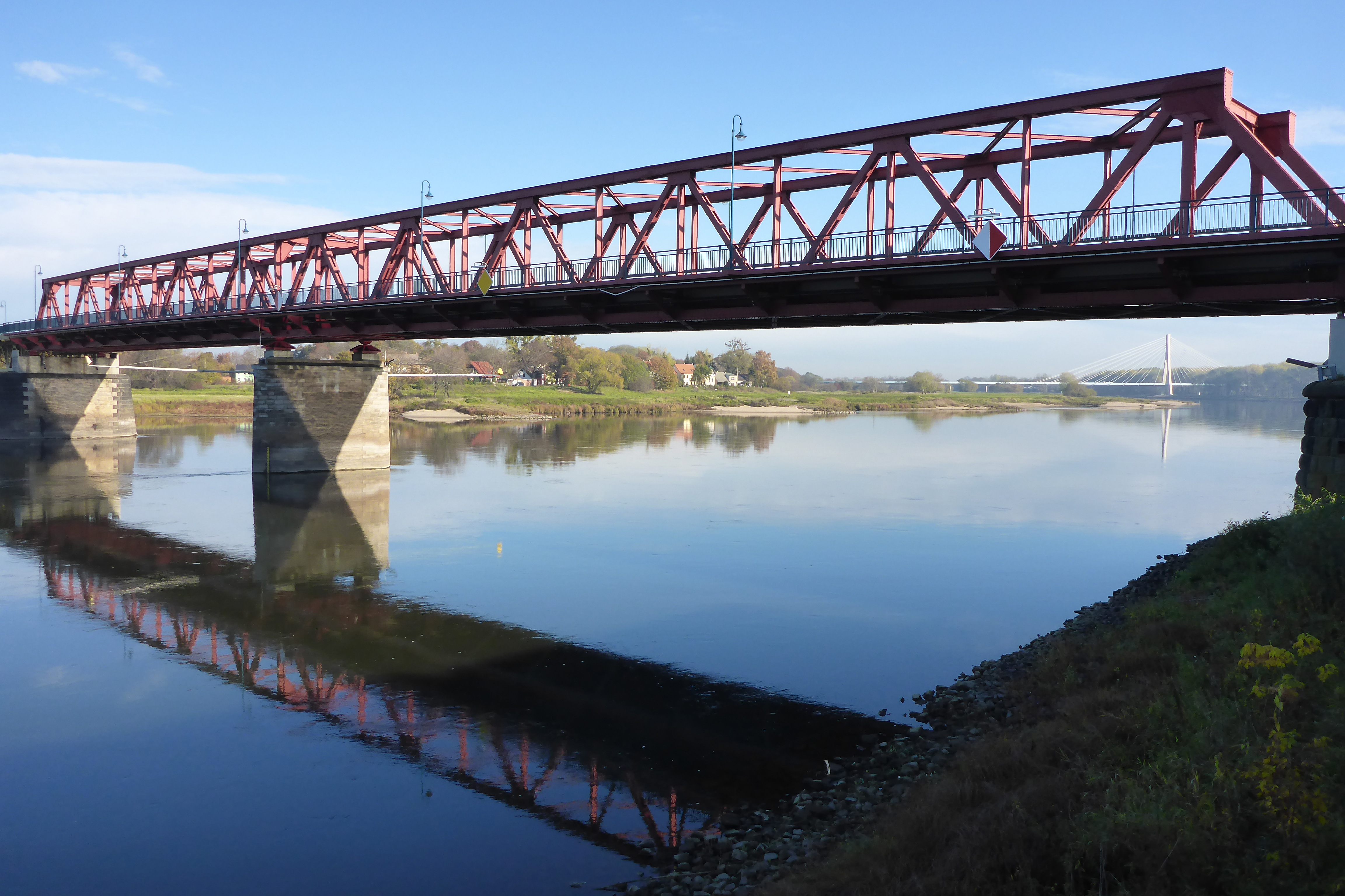 Alte und neue Elbbrücke bei Schönebeck